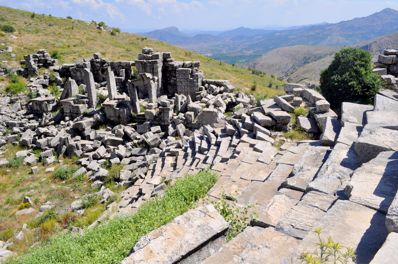 Theater von Sagalassos, Türkei